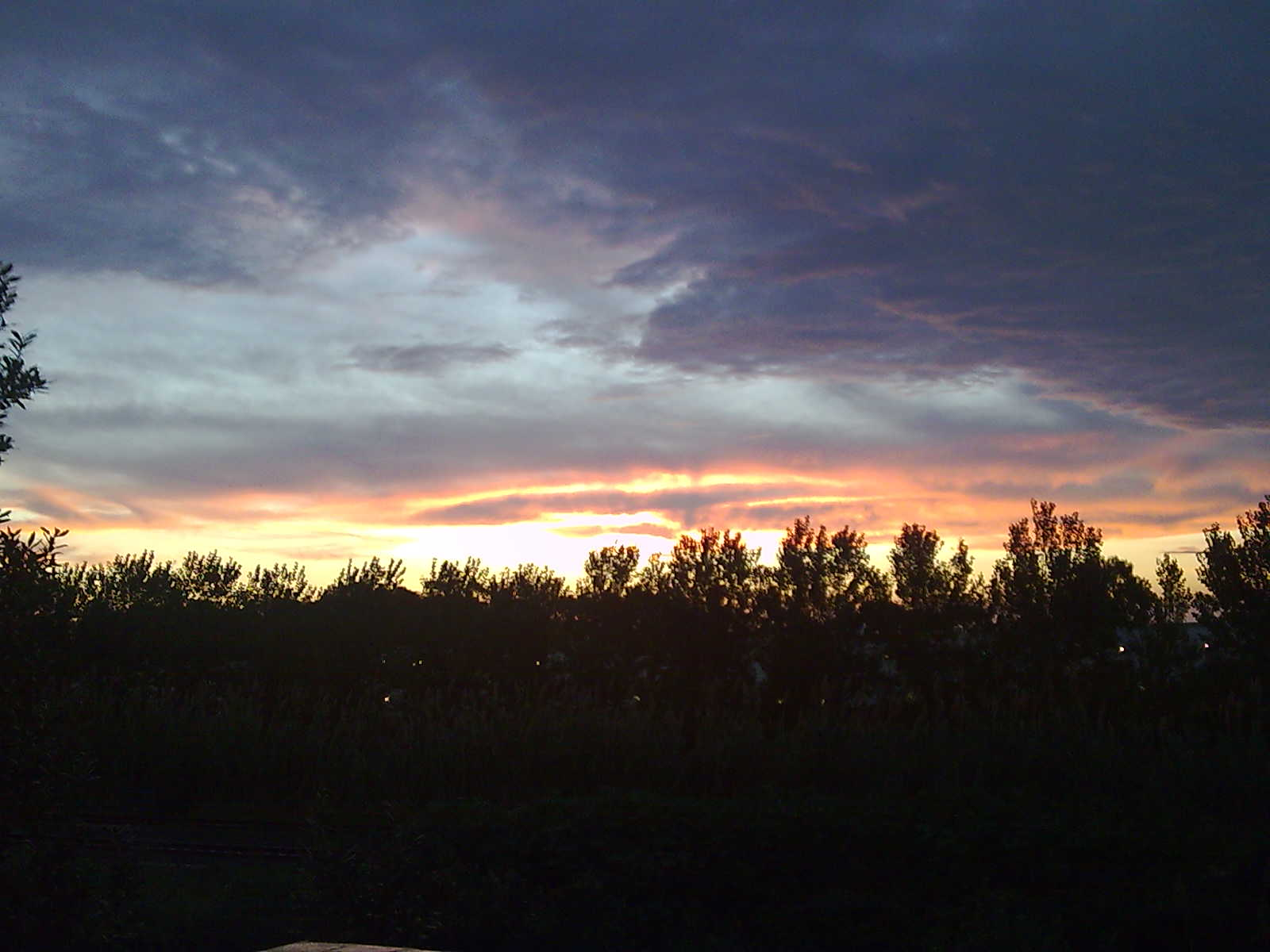 Alba a Squillace lido 26 ottobre 2010 ore 7:03